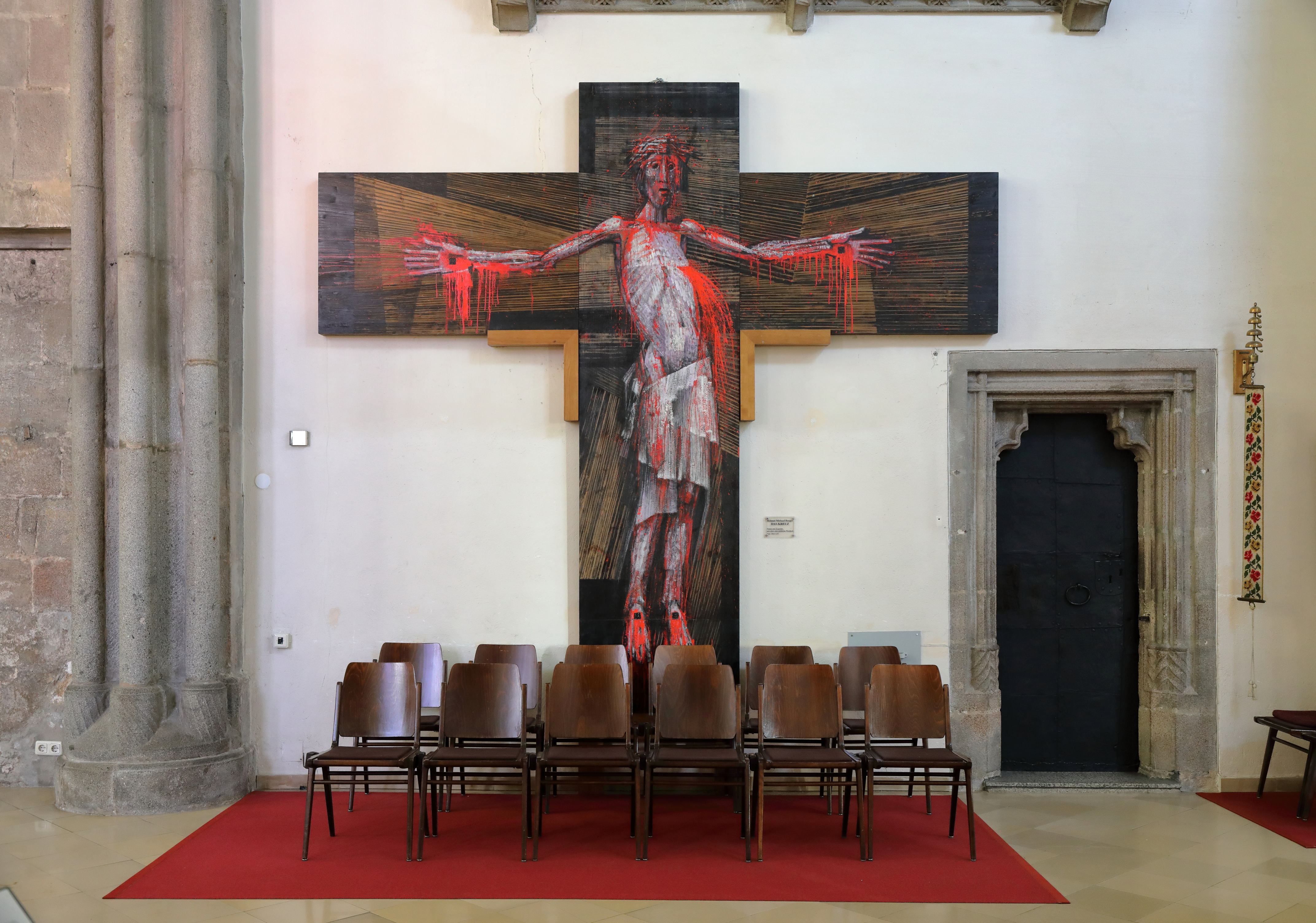 Neuzeitliches Kruzifix in der röm.-kath. Pfarrkirche hl. Katharina in der oberösterreichischen Stadtgemeinde Freistadt. Die Darstellung des Gekreuzigten ist ein Werk des Linzer Künstlers Helmut Michael Berger aus dem Jahr 1998.